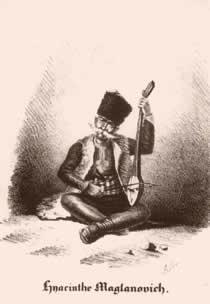 Hyacinthe Maglanovich, frontispice de La Guzla, ou choix de poésies illyriques recueillies dans la Dalmatie, la Bosnie, la Croatie et l'Herzégovine, Paris, F.G. Levrault, 1827.